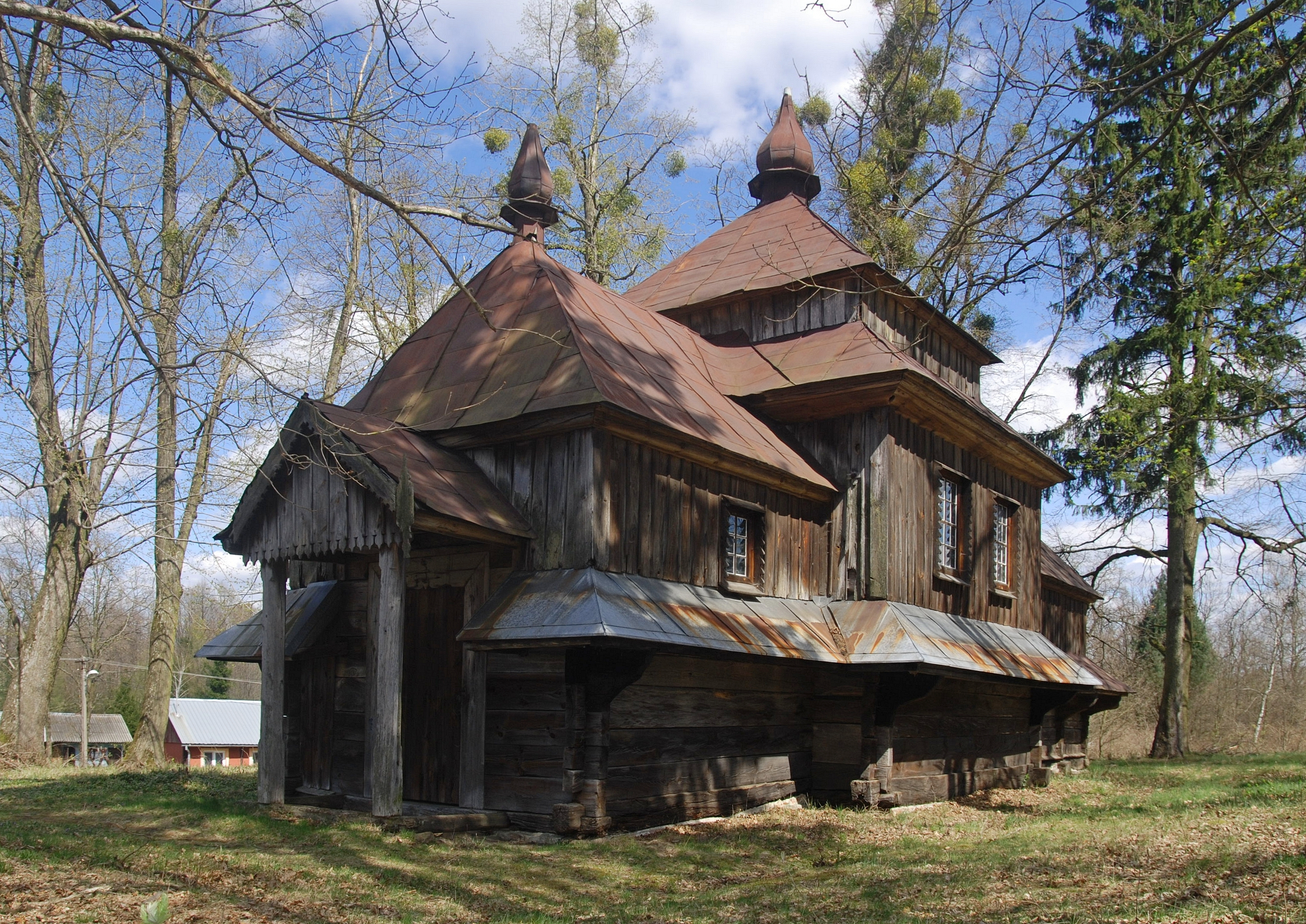 Wólka Żmijowska, cerkiew Opieki Najświętszej Maryi Panny Wikidata has entry Q9186987 with data related to this item.